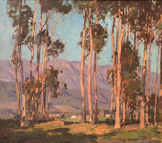 Картины Эдгара Пейна (англ. Edgar Alwin Payne; 1883—1947) — американского художника-импрессиониста